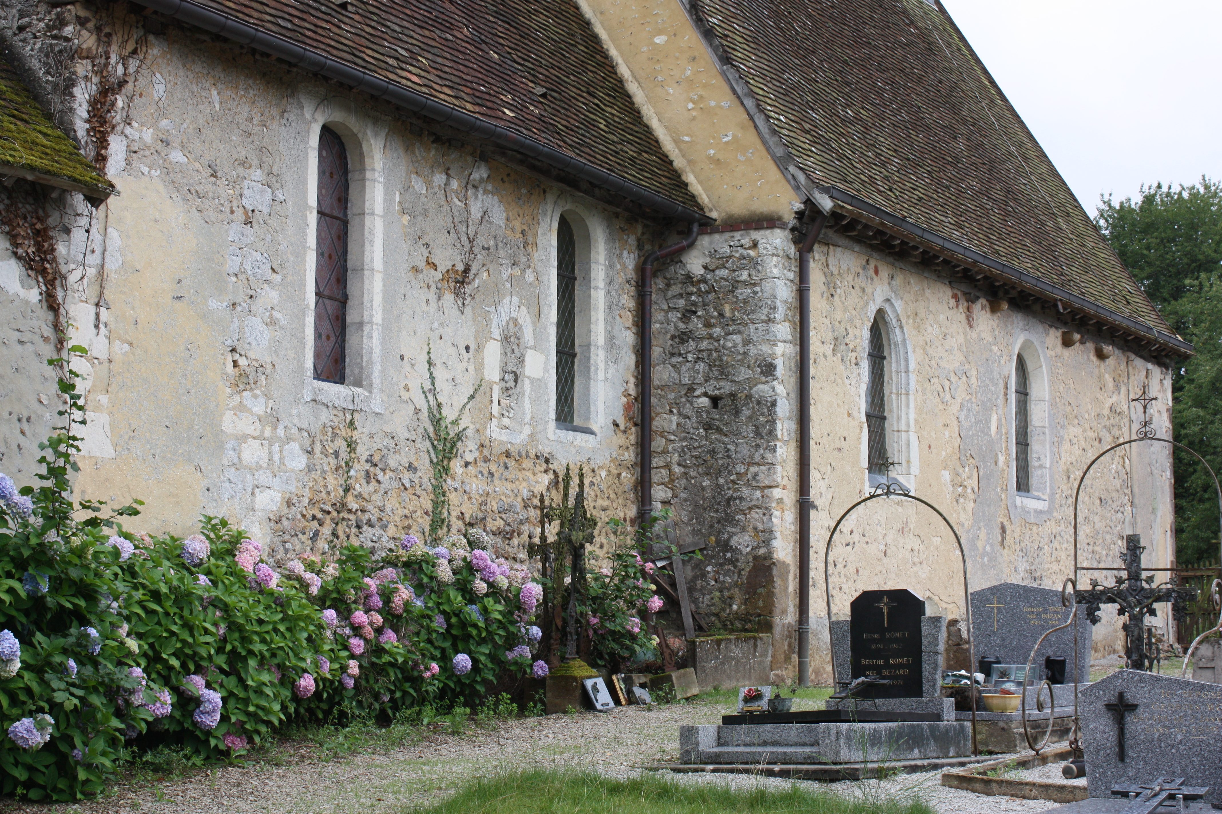 Bizou - Eglise Saint-Germain-de-Paris La nef